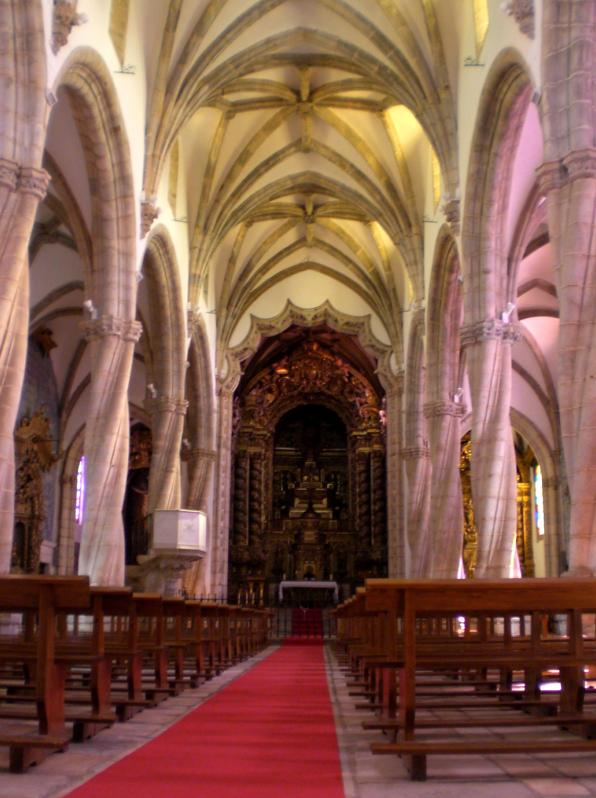 Iglesia de Santa María Magdalena, en Olivenza (Badajoz, España), de estilo gótico